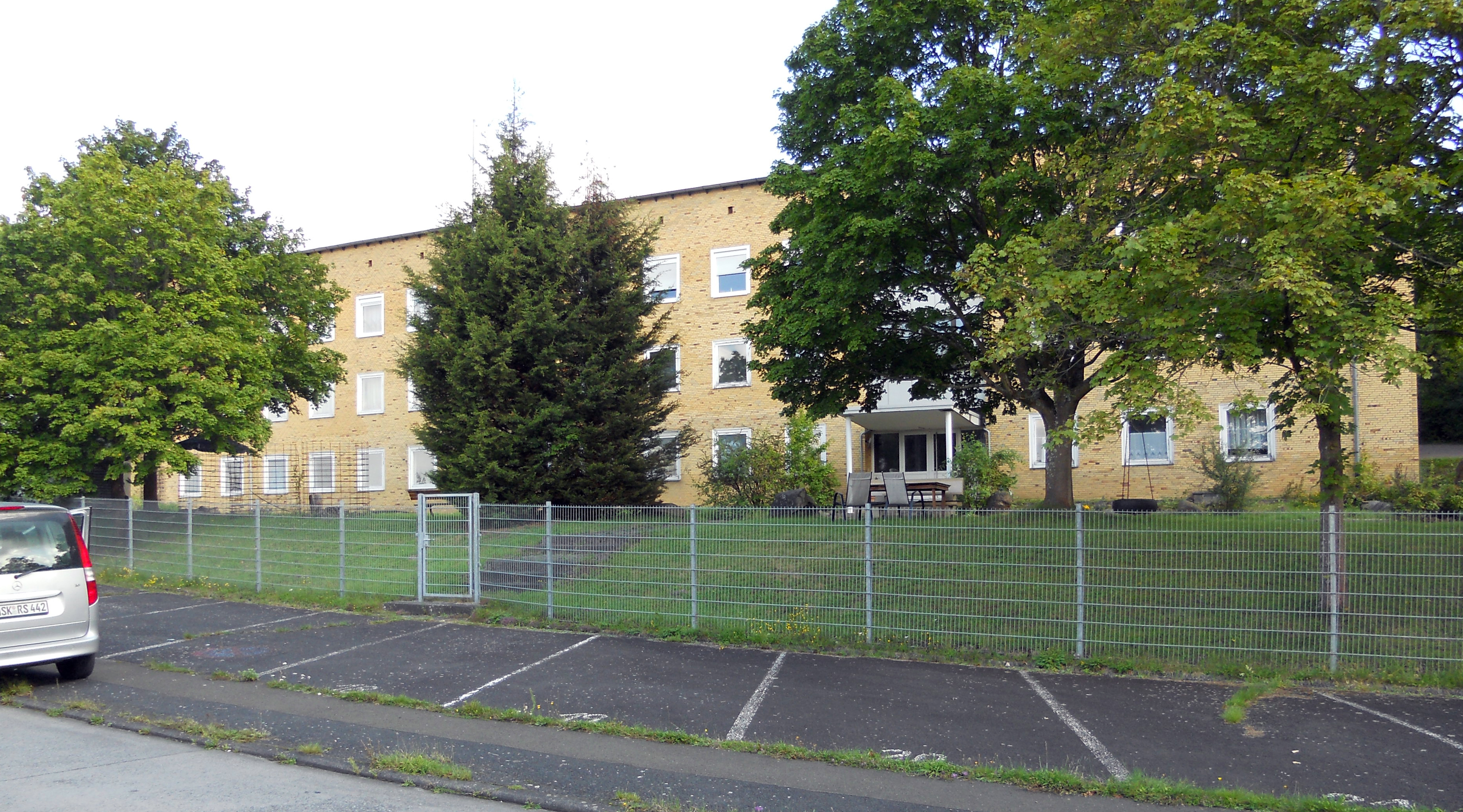 Ehemaliges Kompaniegebäude der Fernspähkompanie 300 in der Aartalkaserne in Herbornseelbach